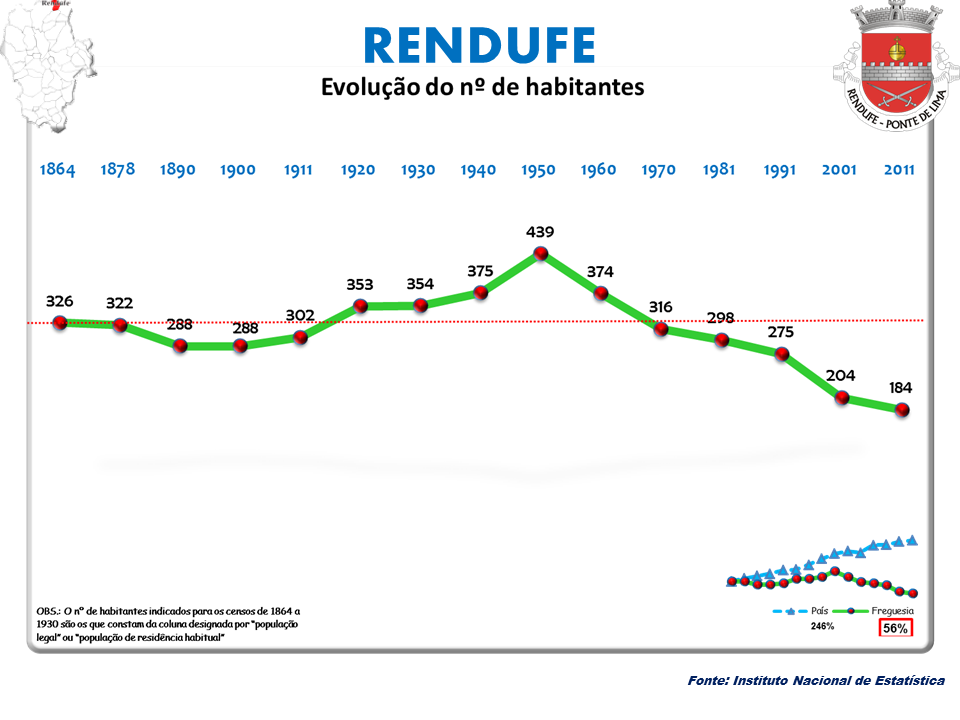 Censos 1864/2011